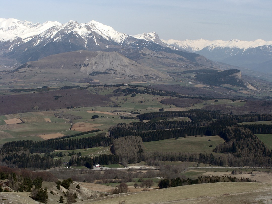 Le seuil de Bayard-Manse vu du col de Gleize. Au premier plan, la route nationale 85 ; puis le plateau de Bayard, puis le Puy de Manse, avec sur sa droite le "chapeau de Napoléon" ; au fond le Piolit.